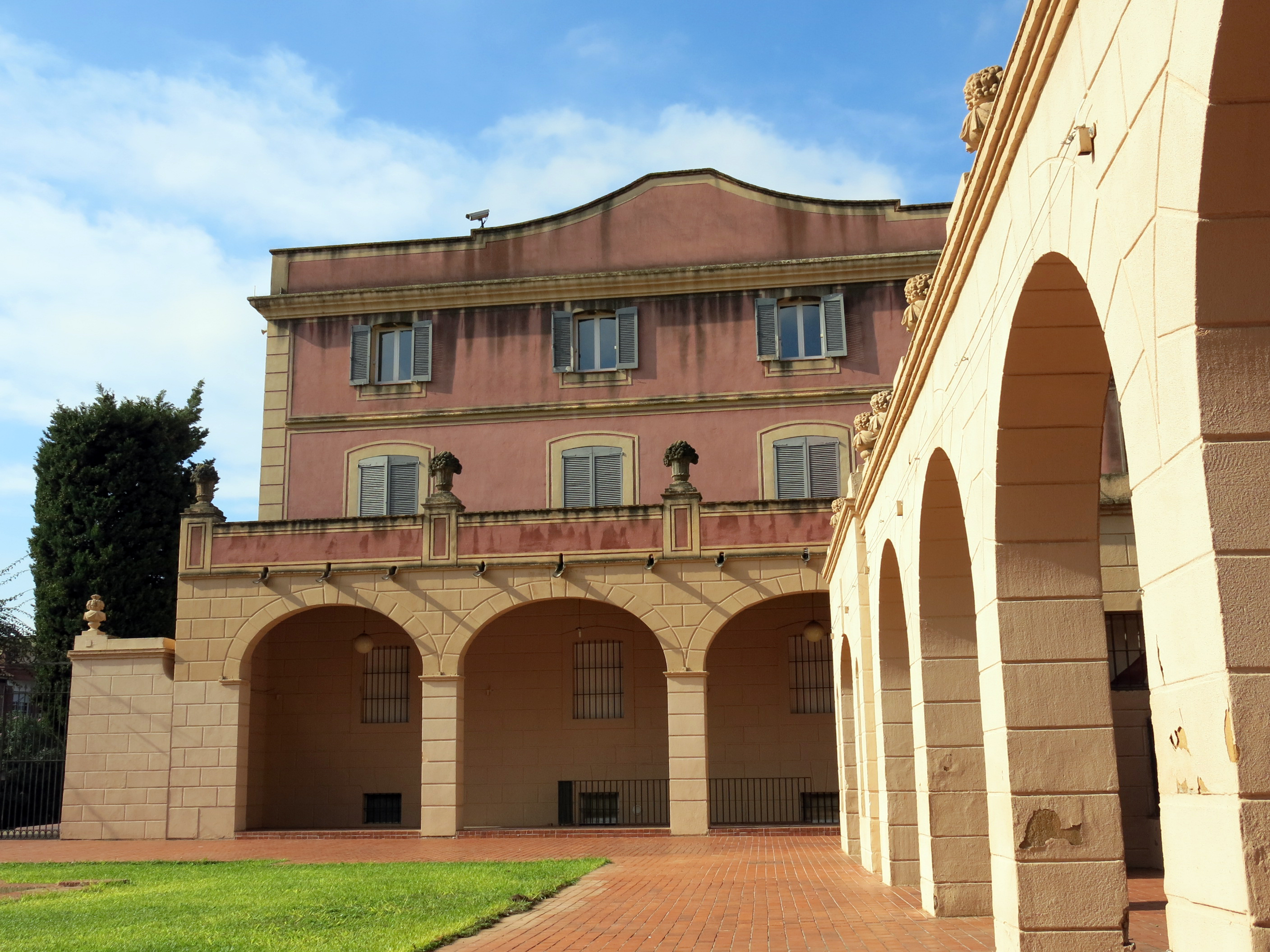 Parc municipal de Can Lluch (Gavà)